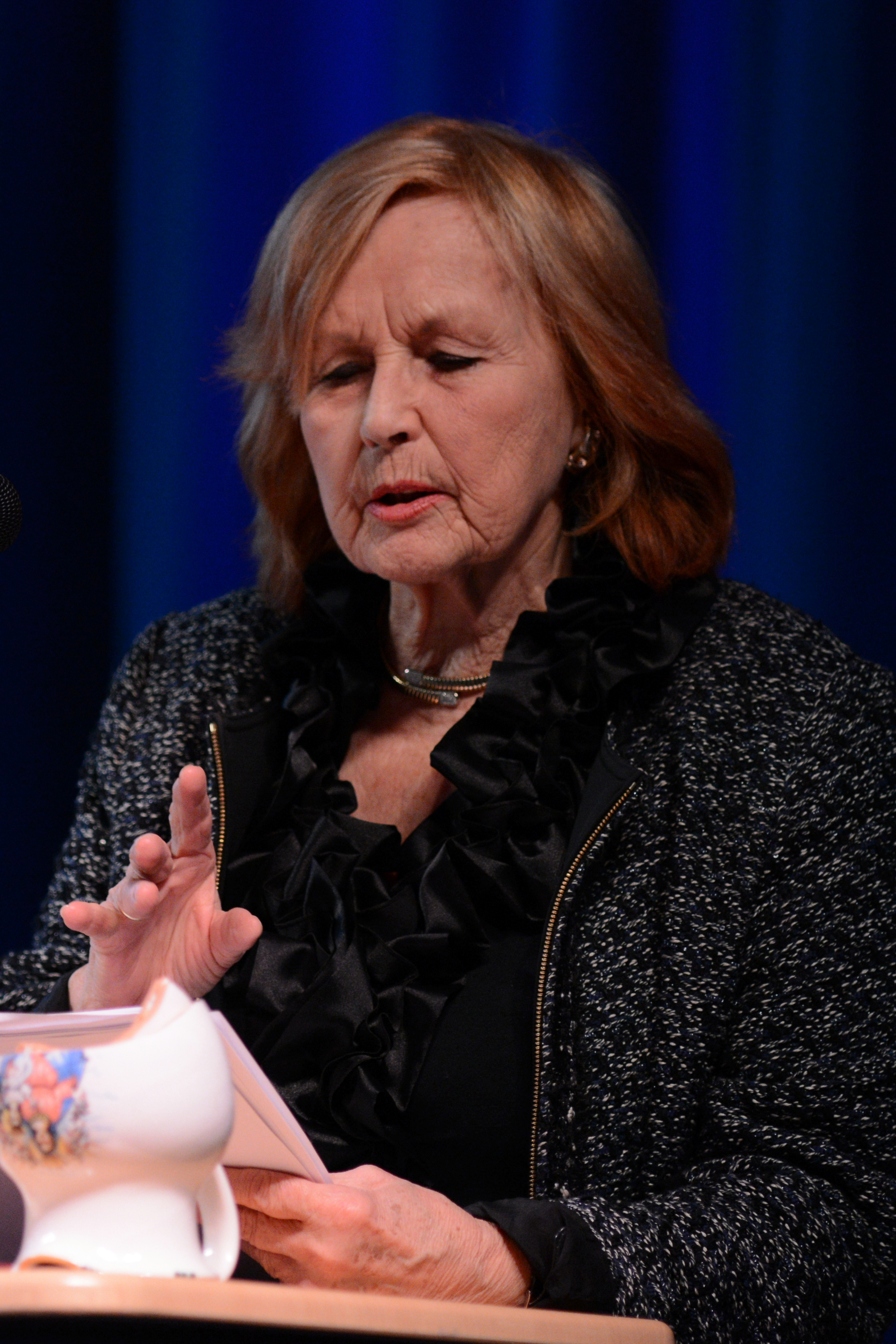 Brigitte Grothum bei einem Auftritt in Duisburg.